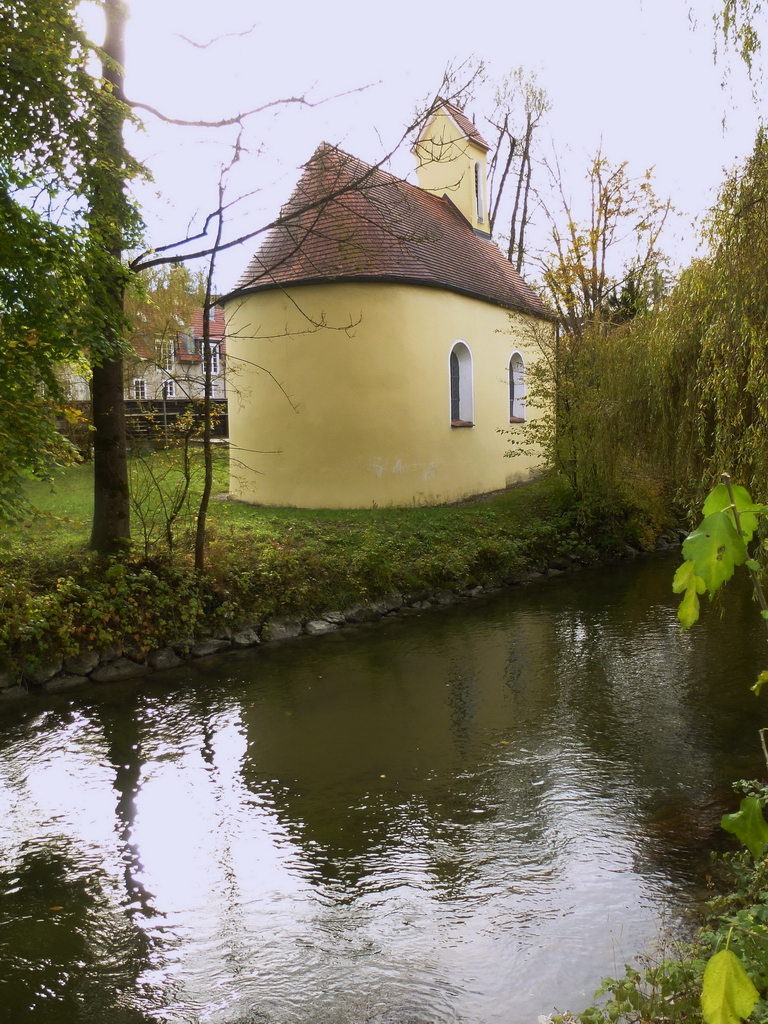 Kapelle St. Nikolaus, 1778 neu errichtetThis is a photograph of an architectural monument.